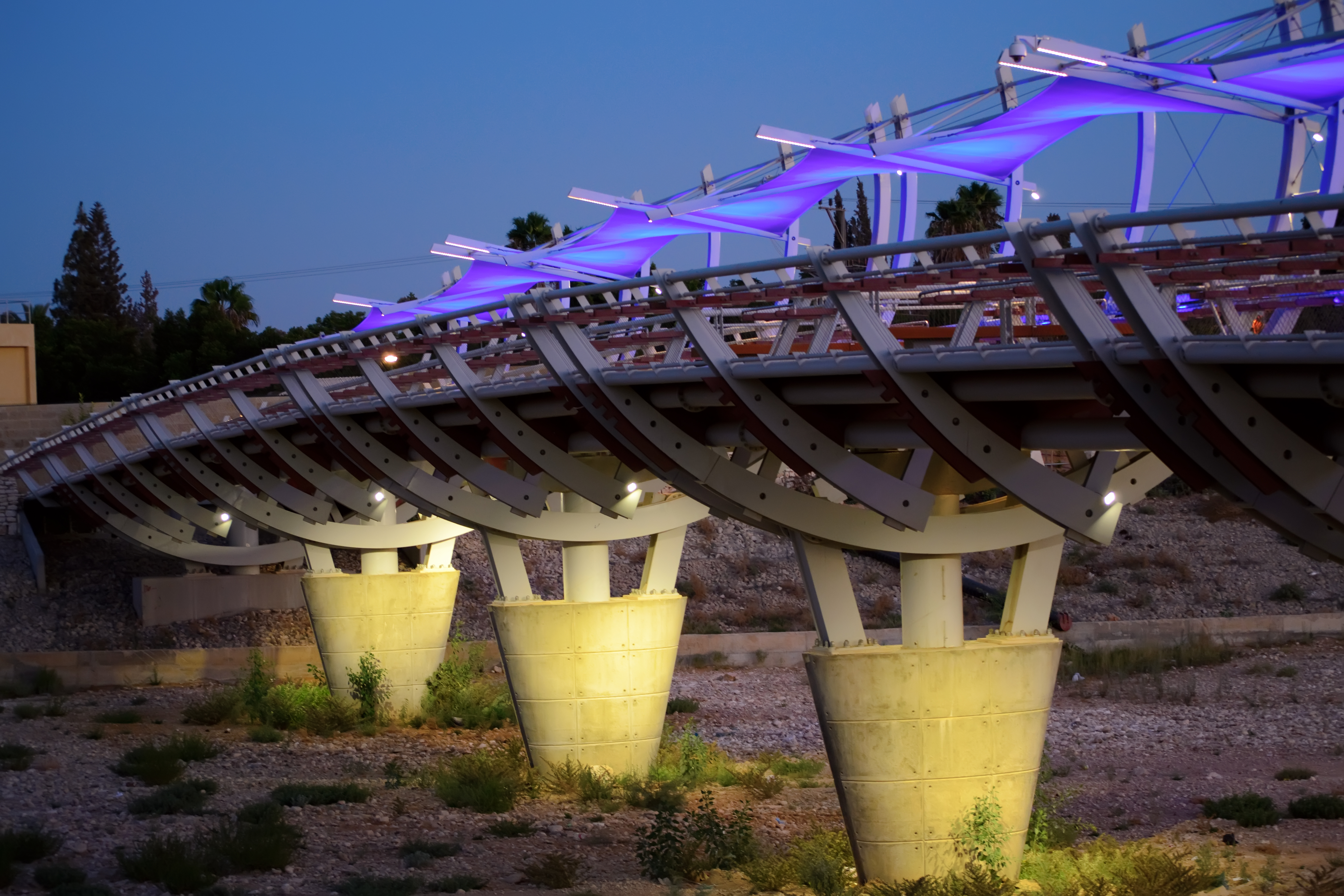 Мост На Трубах который находиться в парке Реки Беер-Шева. г. Беер-Шева